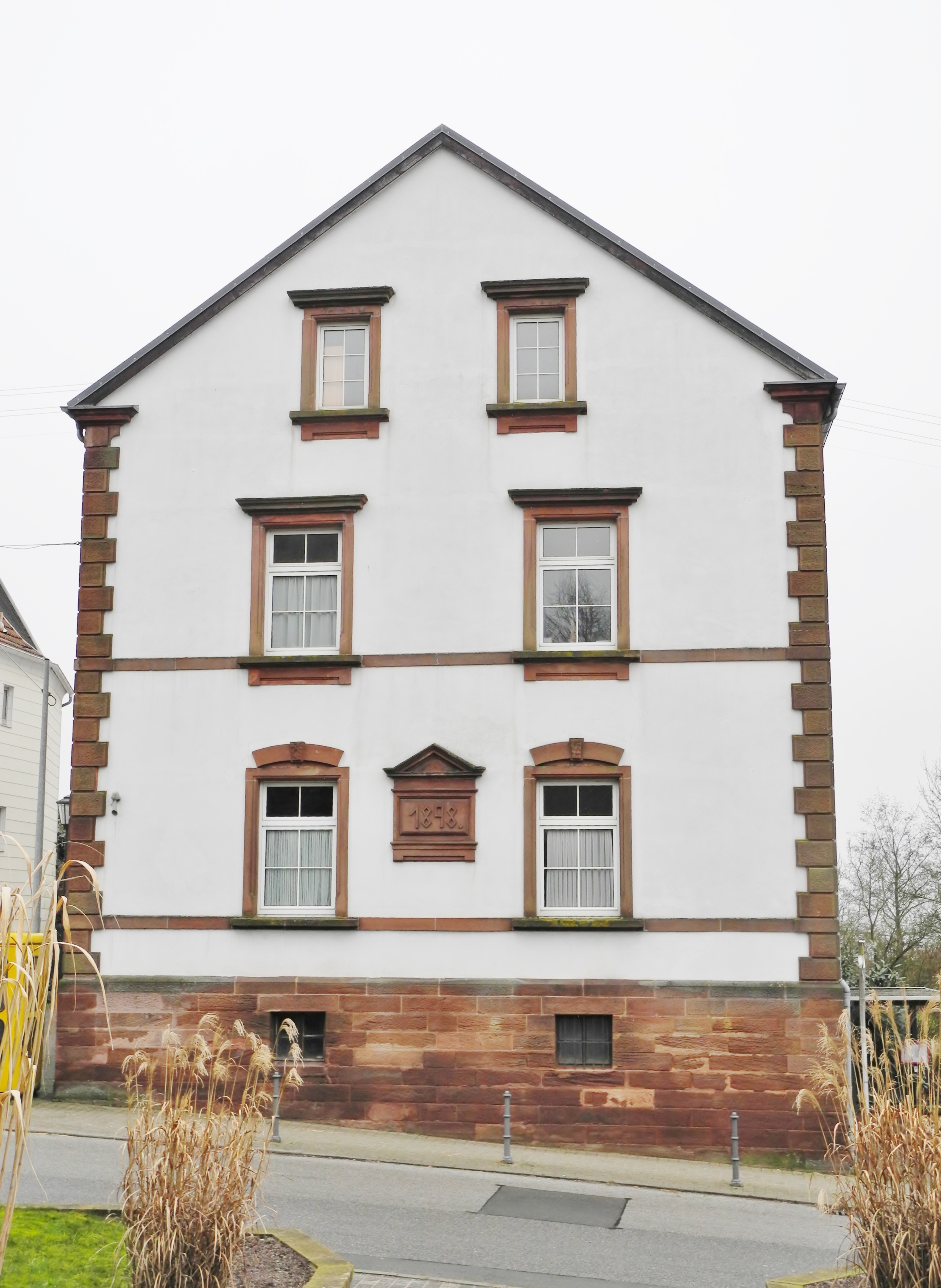 Altes Schulhaus 1898